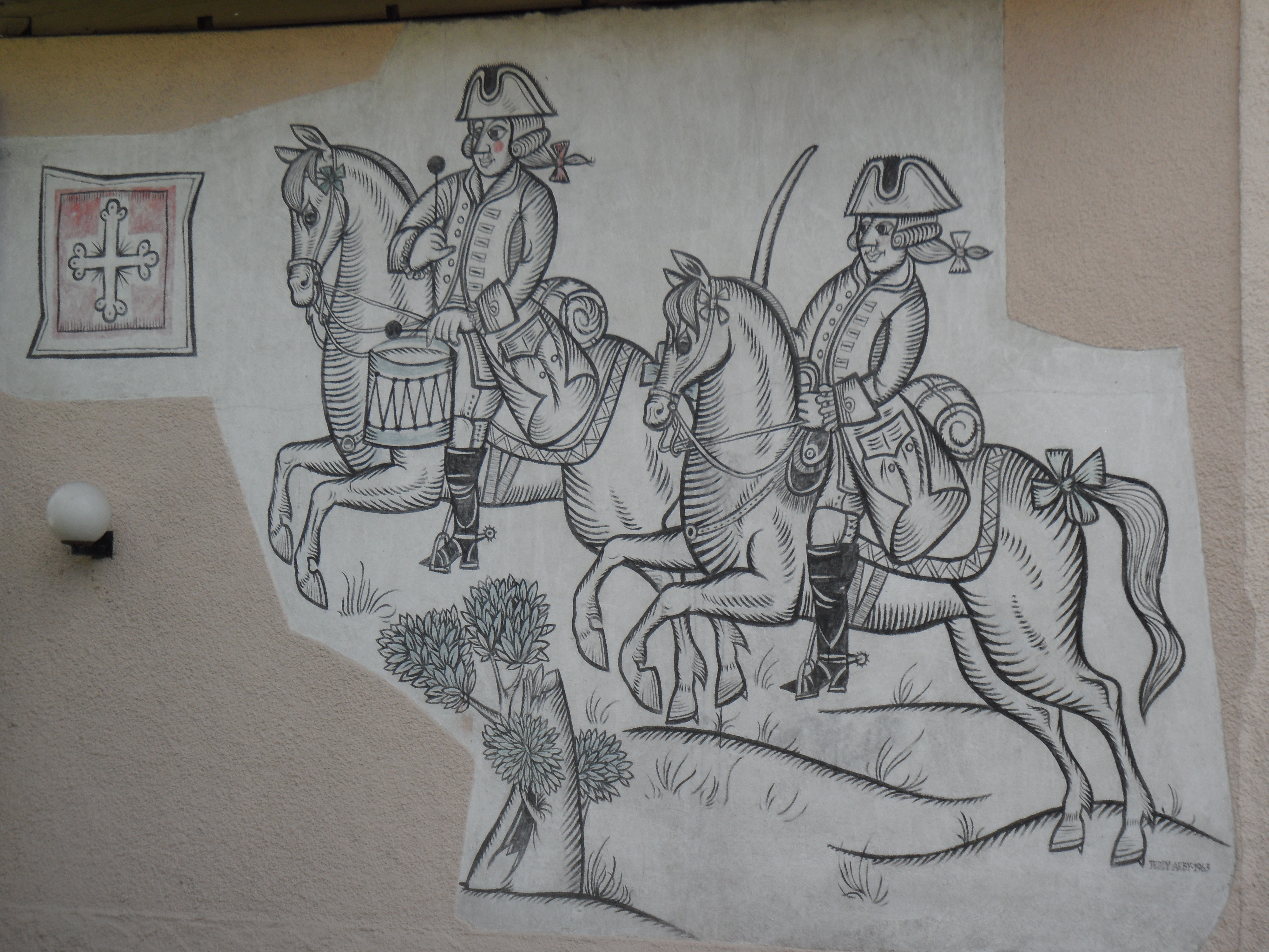 Peinture murale sans texte de Teddy Aeby 1963 à Marly, canton de Fribourg en Suisse